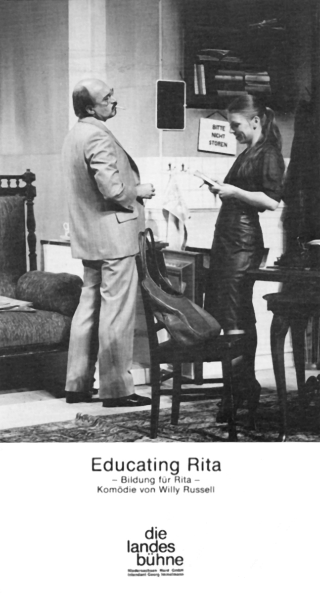 Beschreibung = Programmheft zu Willy Russell, Educating Rita. Landesbühne Niedersachsen Nord, Saison 1981/82.